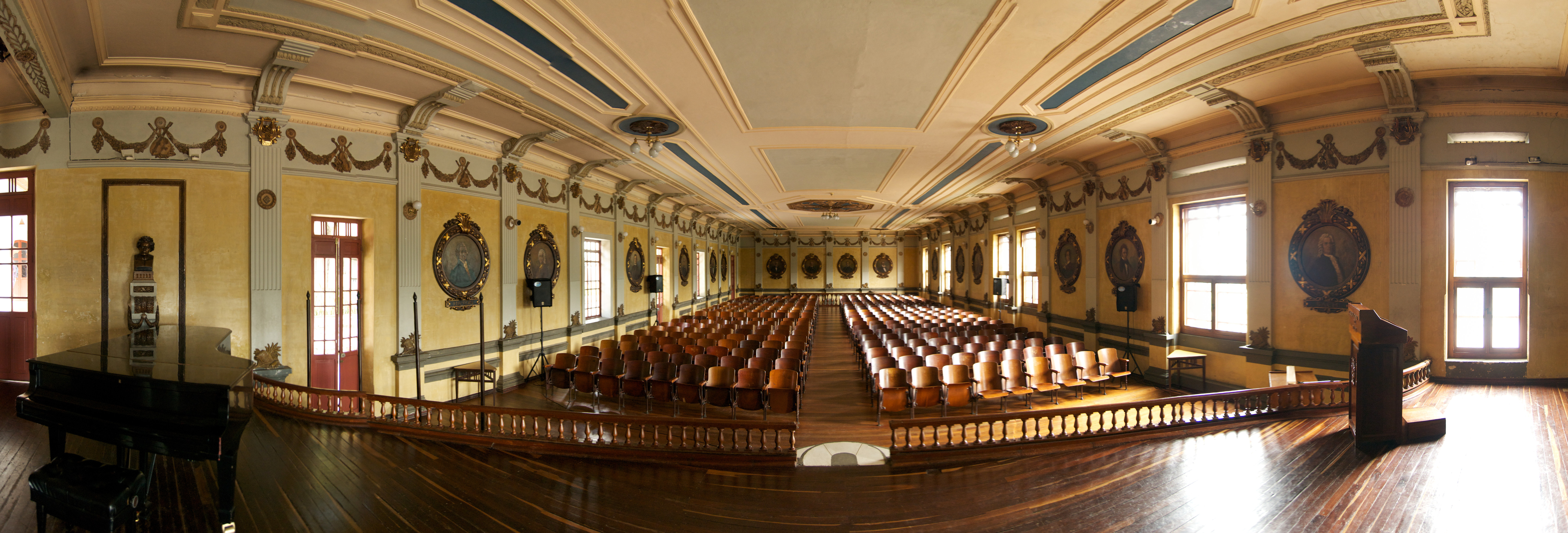 Salón Alberto Castilla y la colección de lienzos del Maestro Domingo Moreno Otero